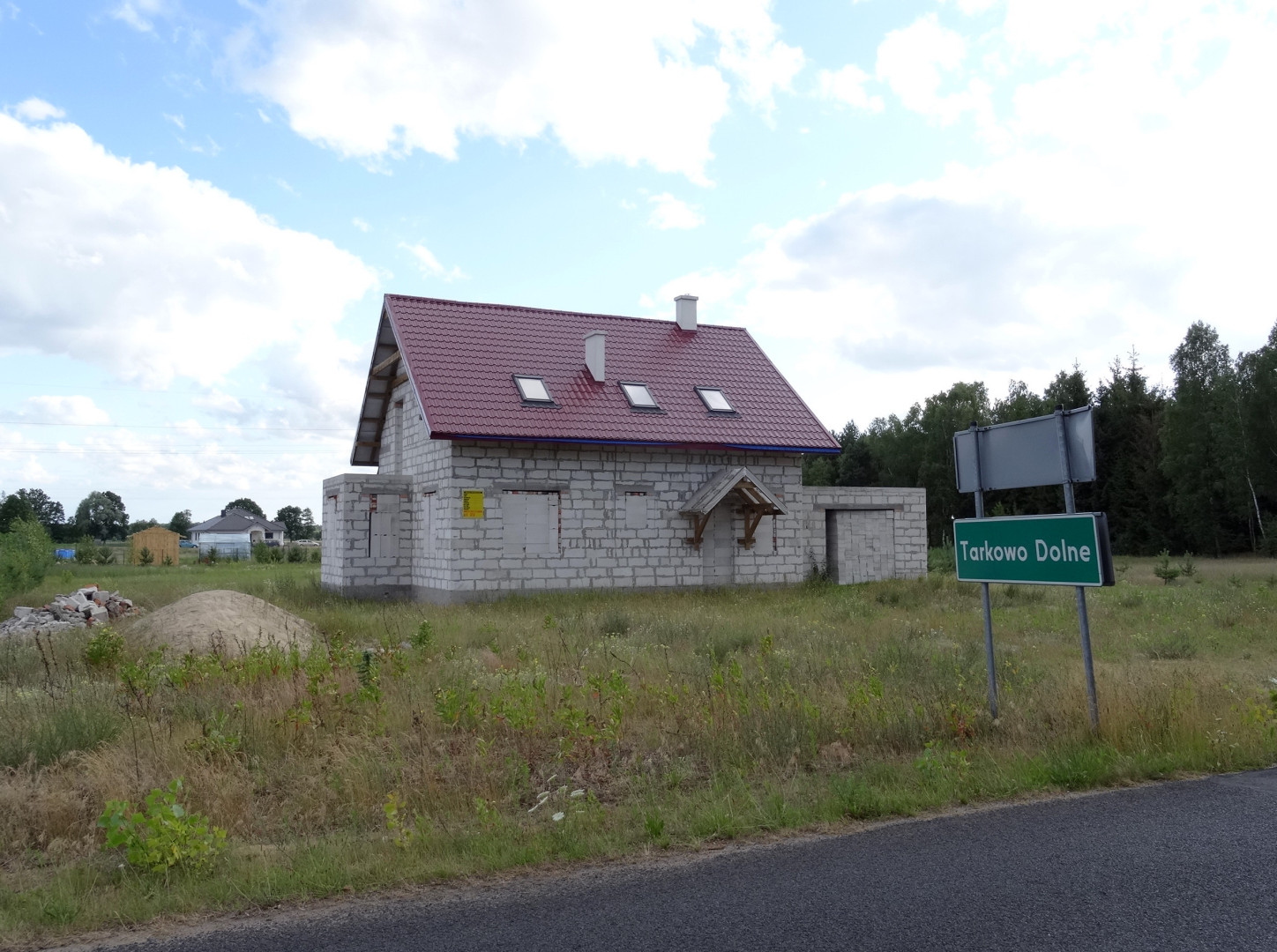 Tarkowo Dolne, gmina Nowa Wieś Wielka, powiat bydgoski